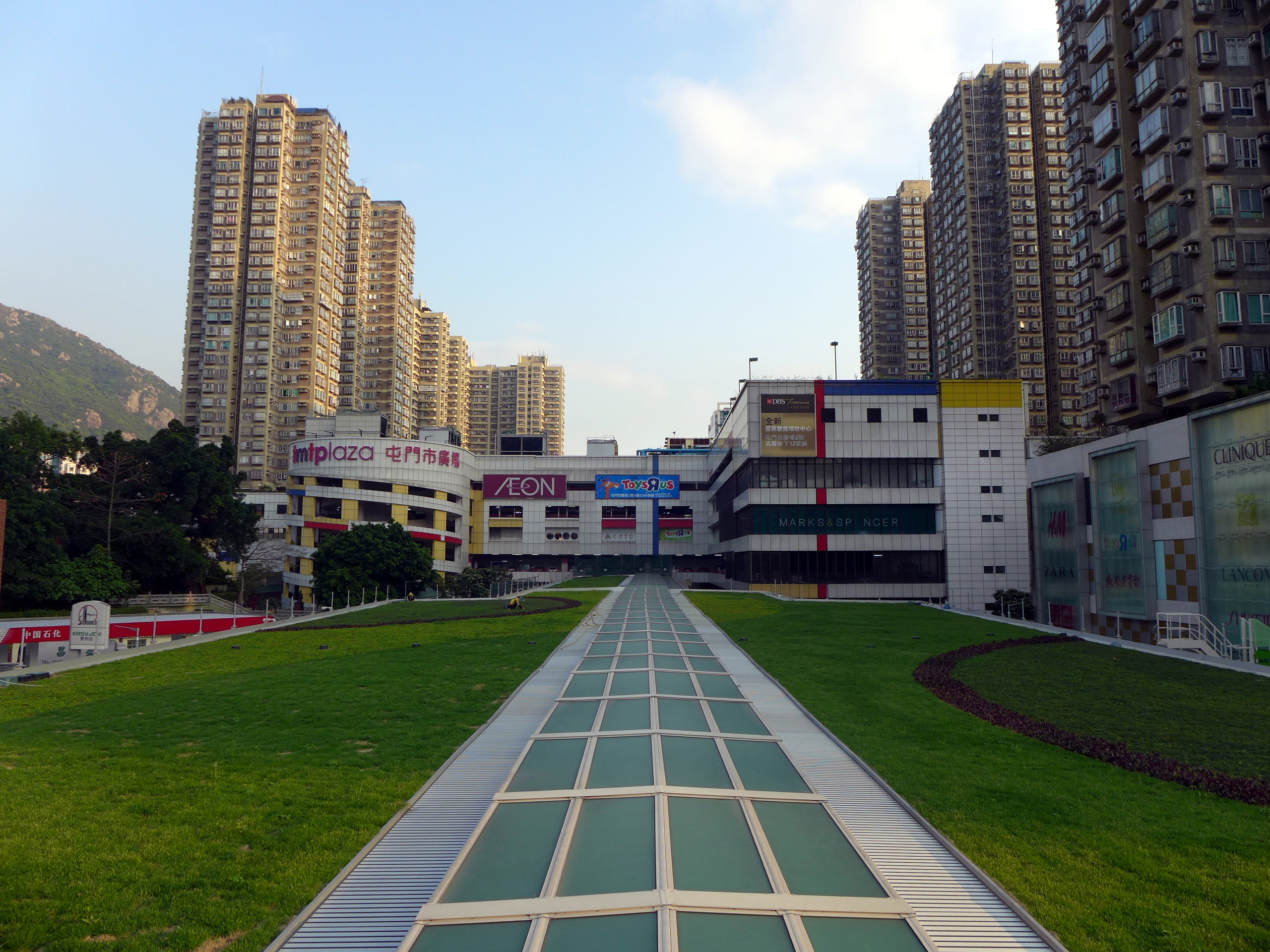 tmtplaza 屯門市廣場